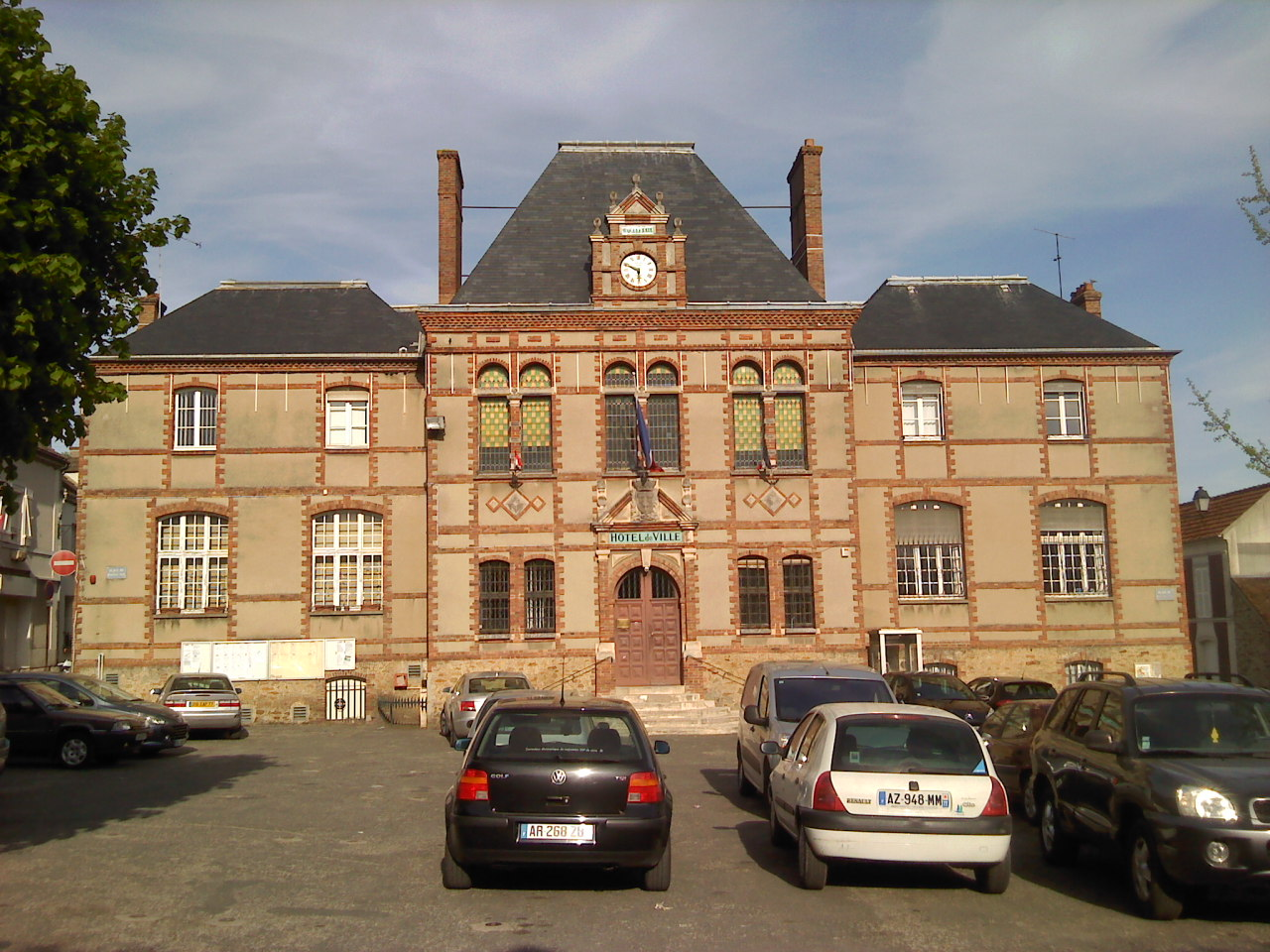 Hôtel de ville de commune de Seine-et-Marne (France) Hôtel de ville de Chaumes-en-Brie (Seine-et-Marne)